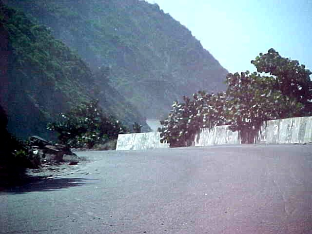 Via a Naiguata en el estado Vargas - Venezuela a un año de del deslave de diciembre de 1999 (2000)